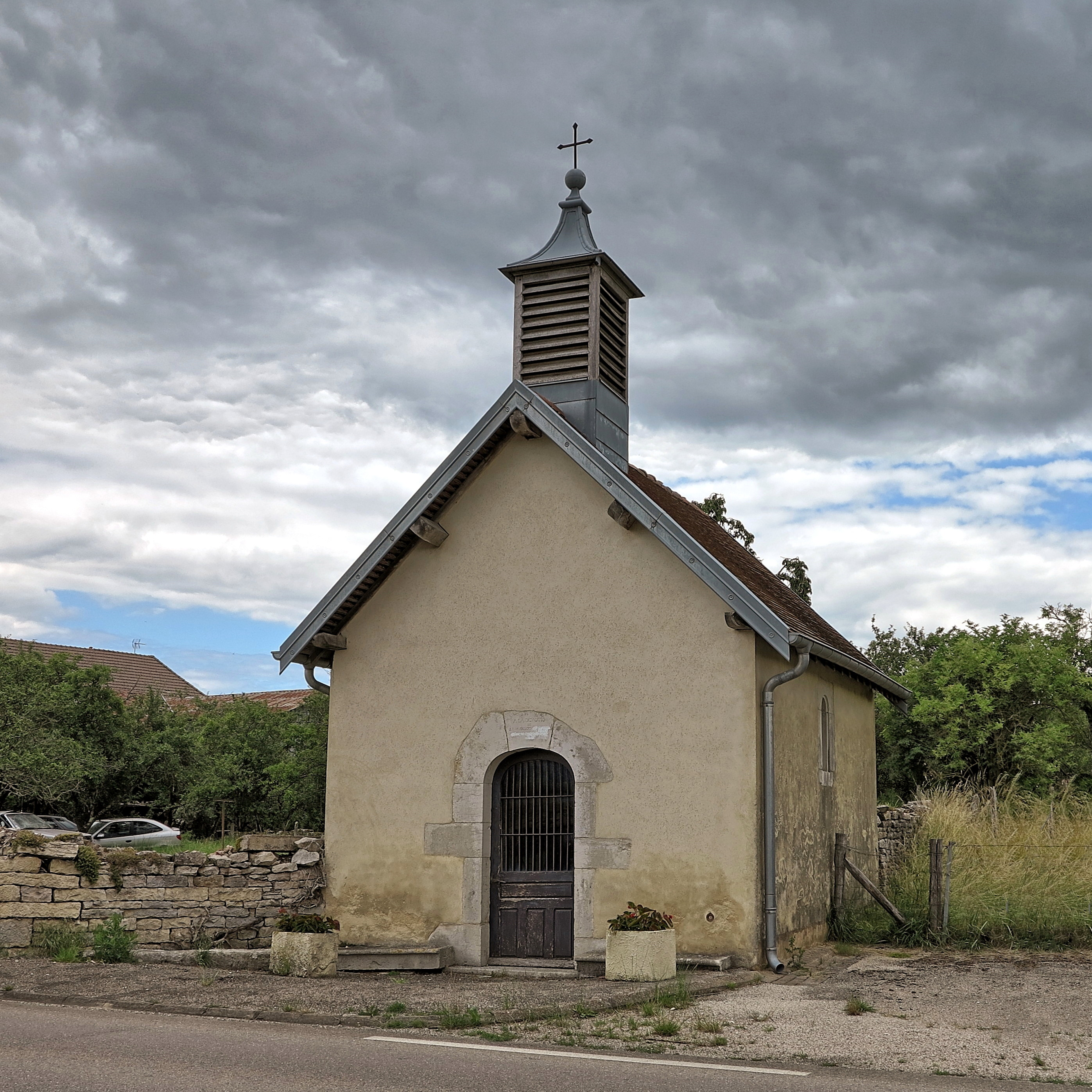 La chapelle de Velleclaire